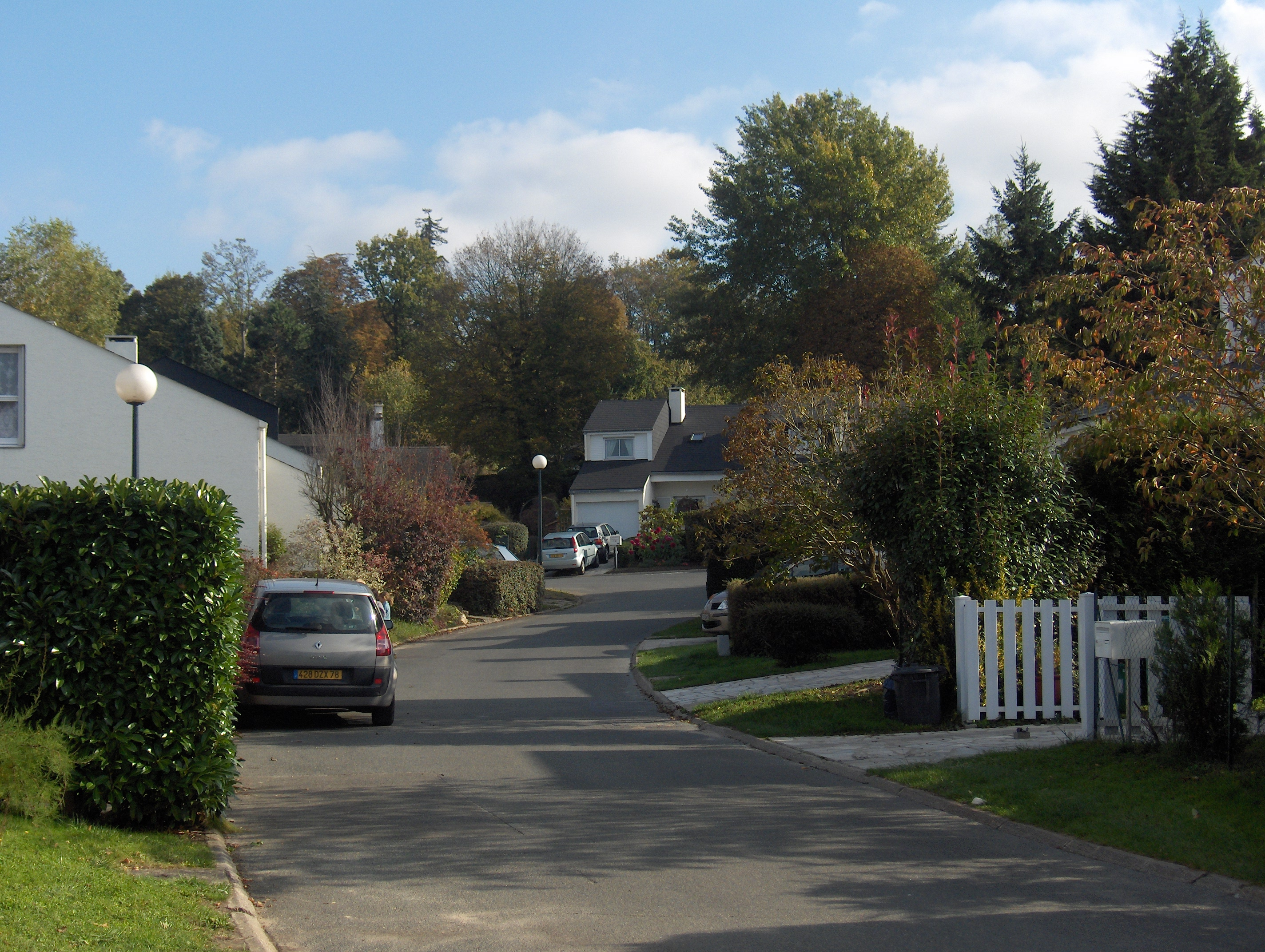 Rue pavillonnaire à L'Isle-Adam dans la partie basse du parc de Cassan